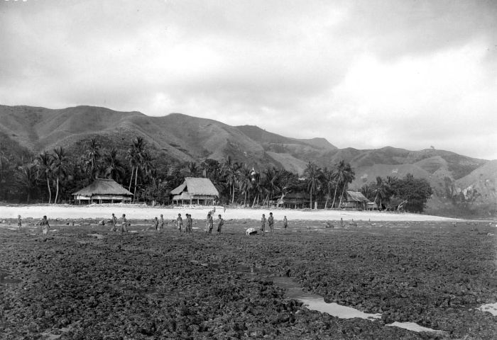 Negatief. Mensen bij een drooggelopen karangrif op het zandstrand bij Kampong Sika, Oost Flores